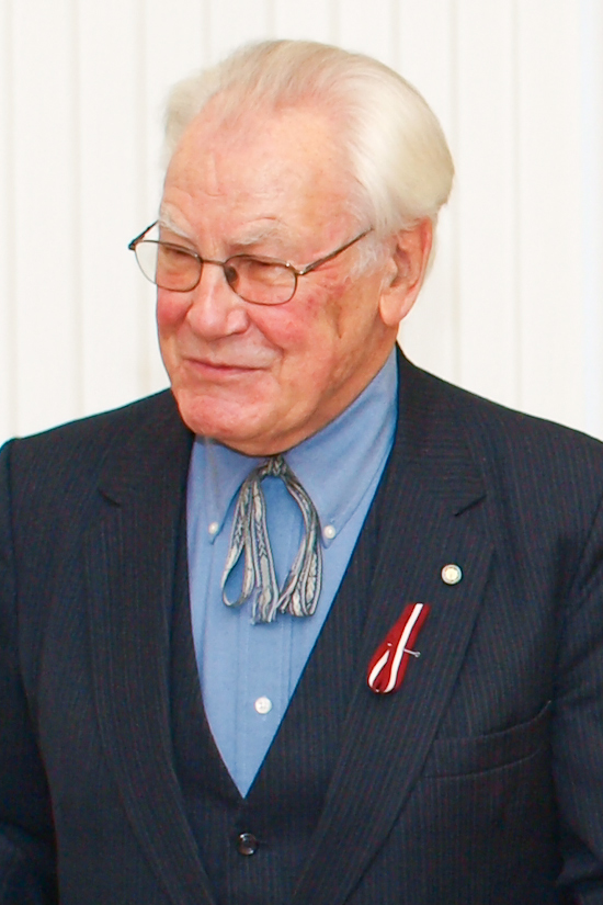 Attēlā (no kreisās): Latvijas Okupācijas muzeja biedrības valdes priekšsēdētājs Valters Nollendorfs un Ministru prezidents Valdis Dombrovskis Foto: Toms Norde, Valsts kanceleja